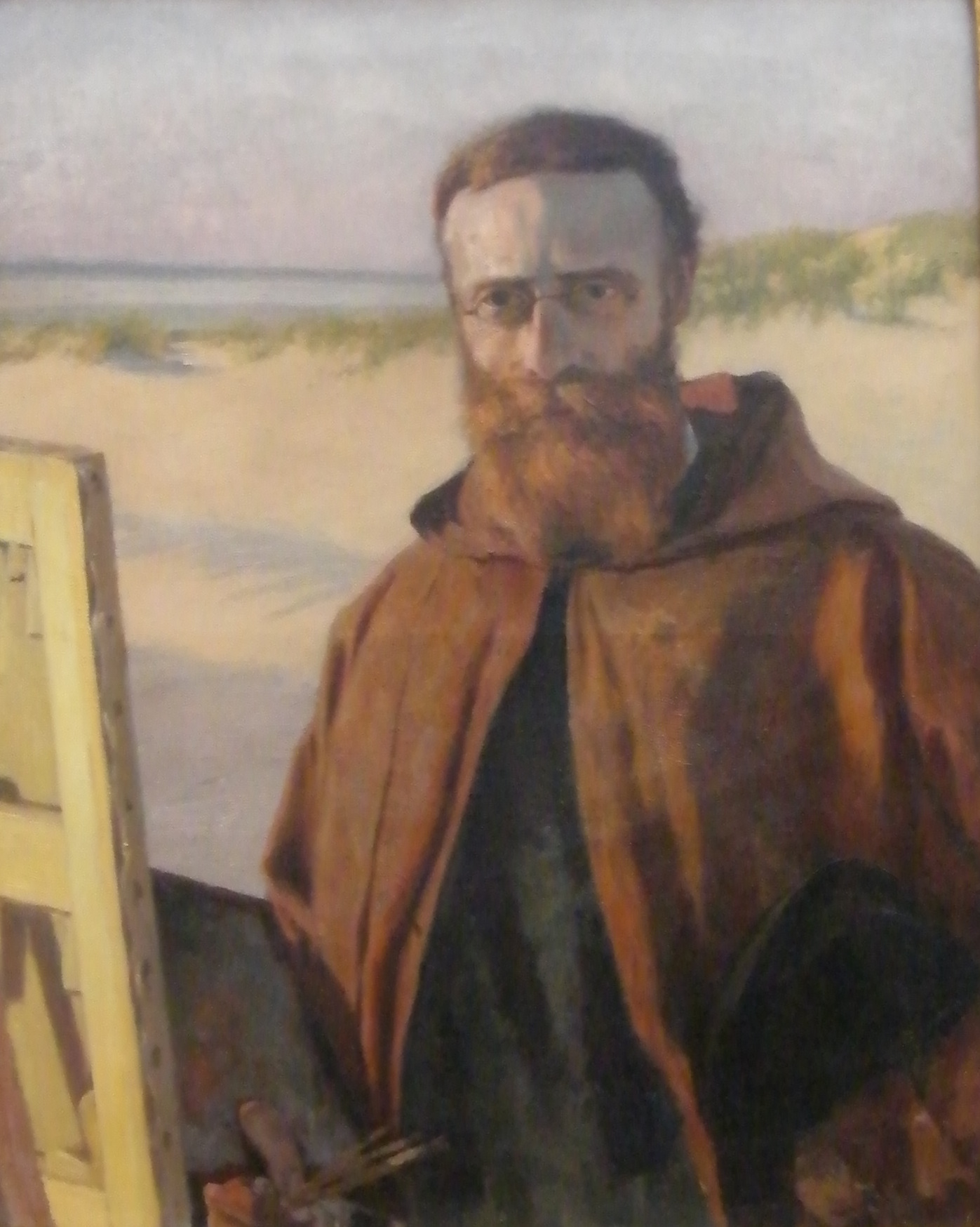 Autoportrait de Francis Tattegrain (1852-1915).